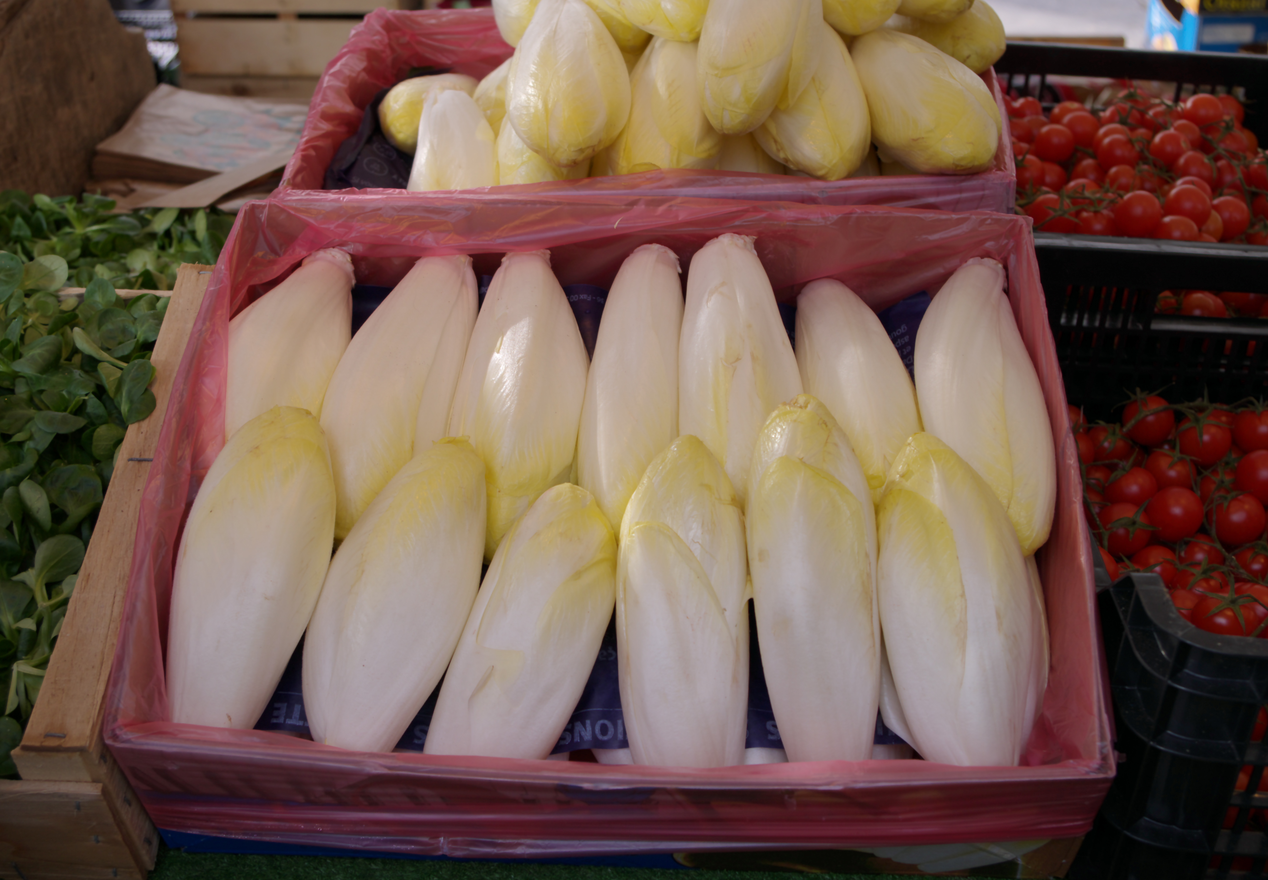 Endives au marché